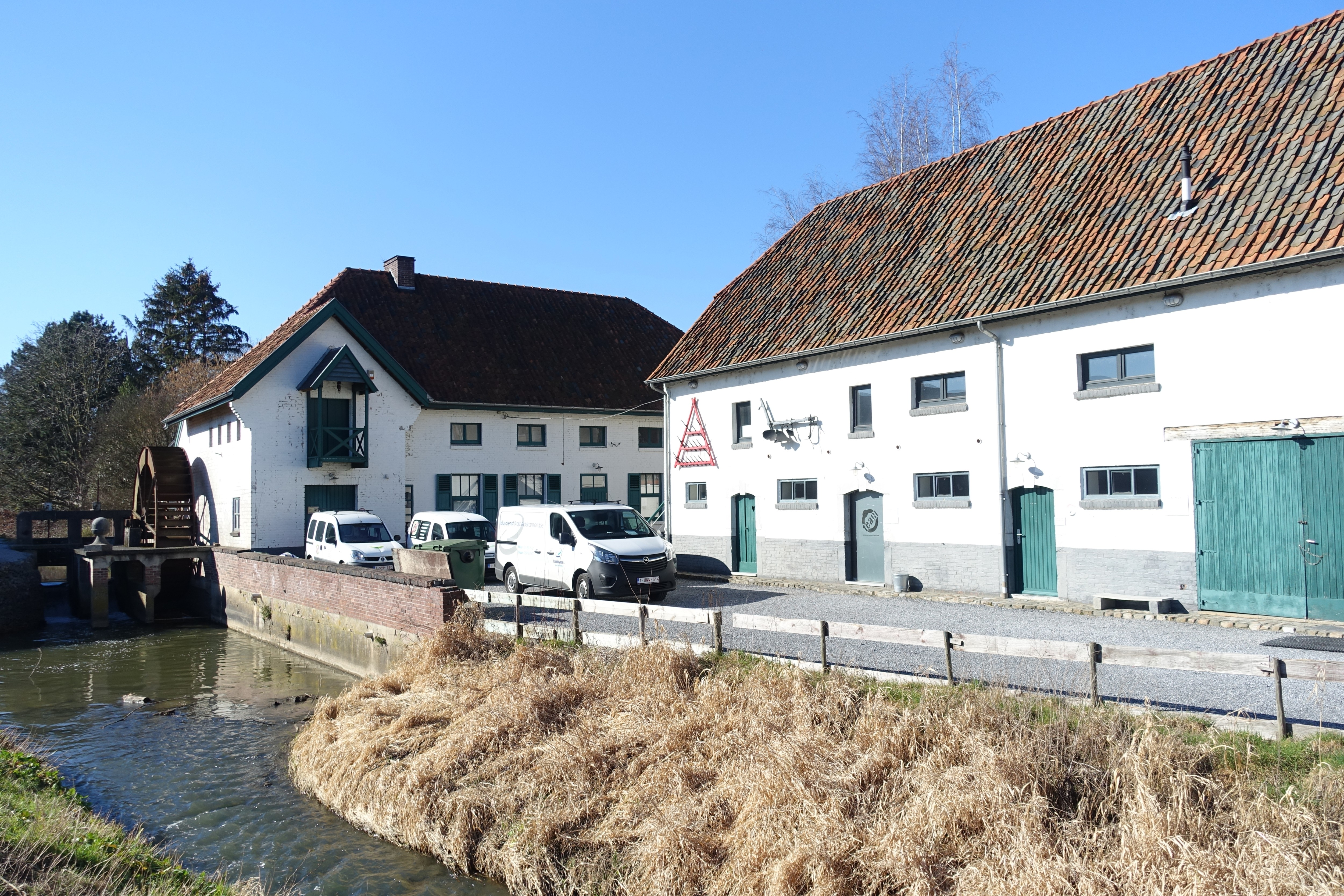 Groenmolen in Alken, een watermolen op de Herk, 18de eeuw .